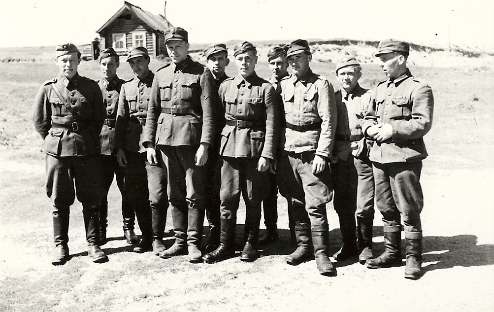 SissiOs./5.D